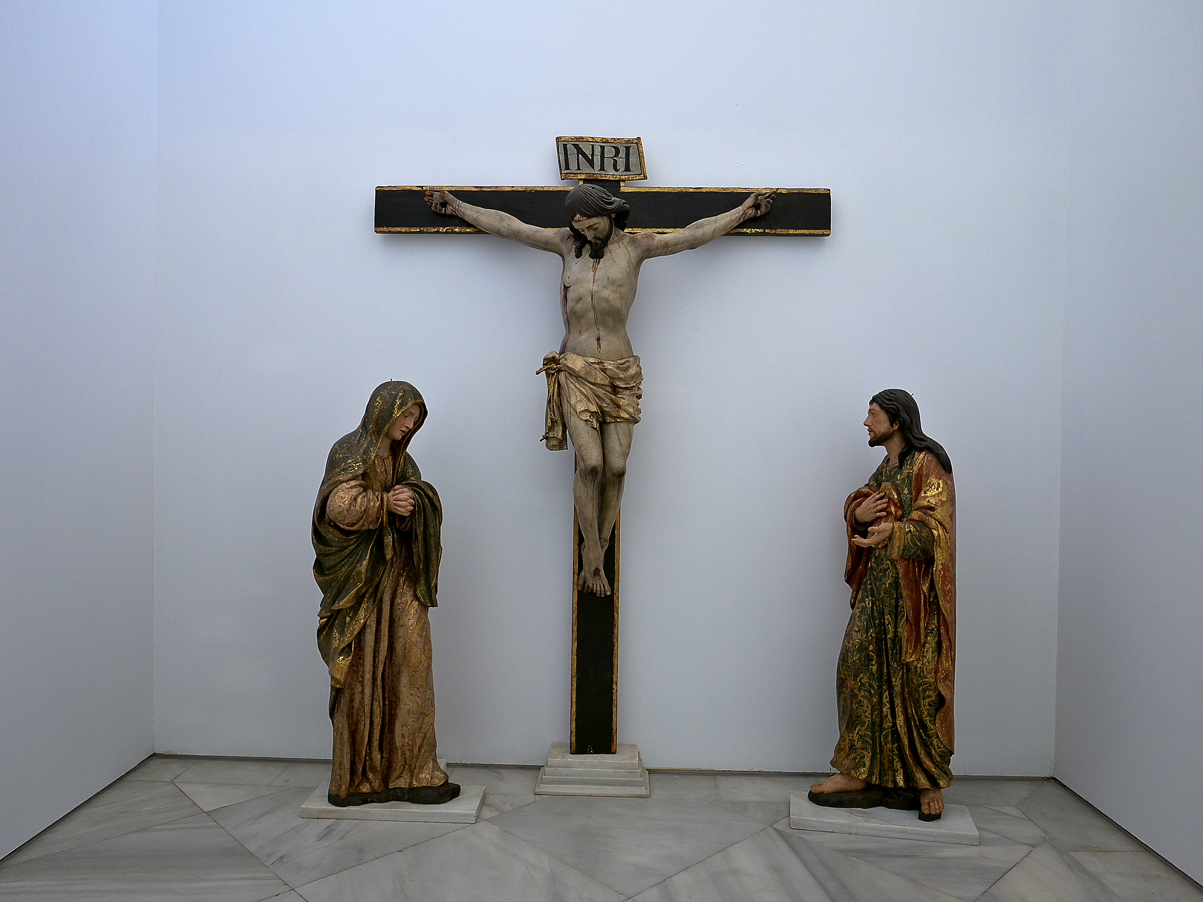 En el año 1533, el monasterio cartujo de Sevilla contrata a Isidro de Villoldo (†1560) para el retablo mayor de la iglesia monástica, retablo que terminaría su amigo y compañero de taller en Ávila, Juan Bautista Vázquez, el Viejo. Este hecho artístico ocasionará la llegada de la escultura castellana a la ciudad renacentista. El Calvario de la Cartuja de Sevilla está datado entre 1553 y 1555, madera policromada y estofada.